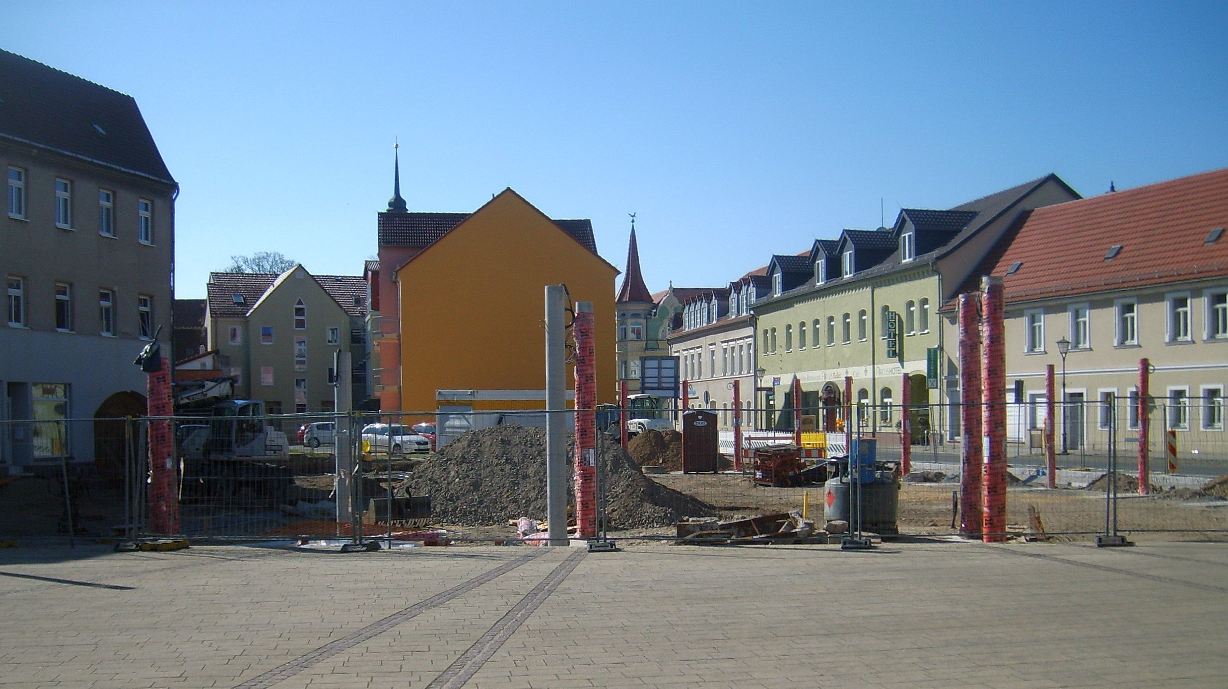 Die Bauarbeiten auf dem Südspitze genannten südlichen Teil des Marktes in Elsterwerda.